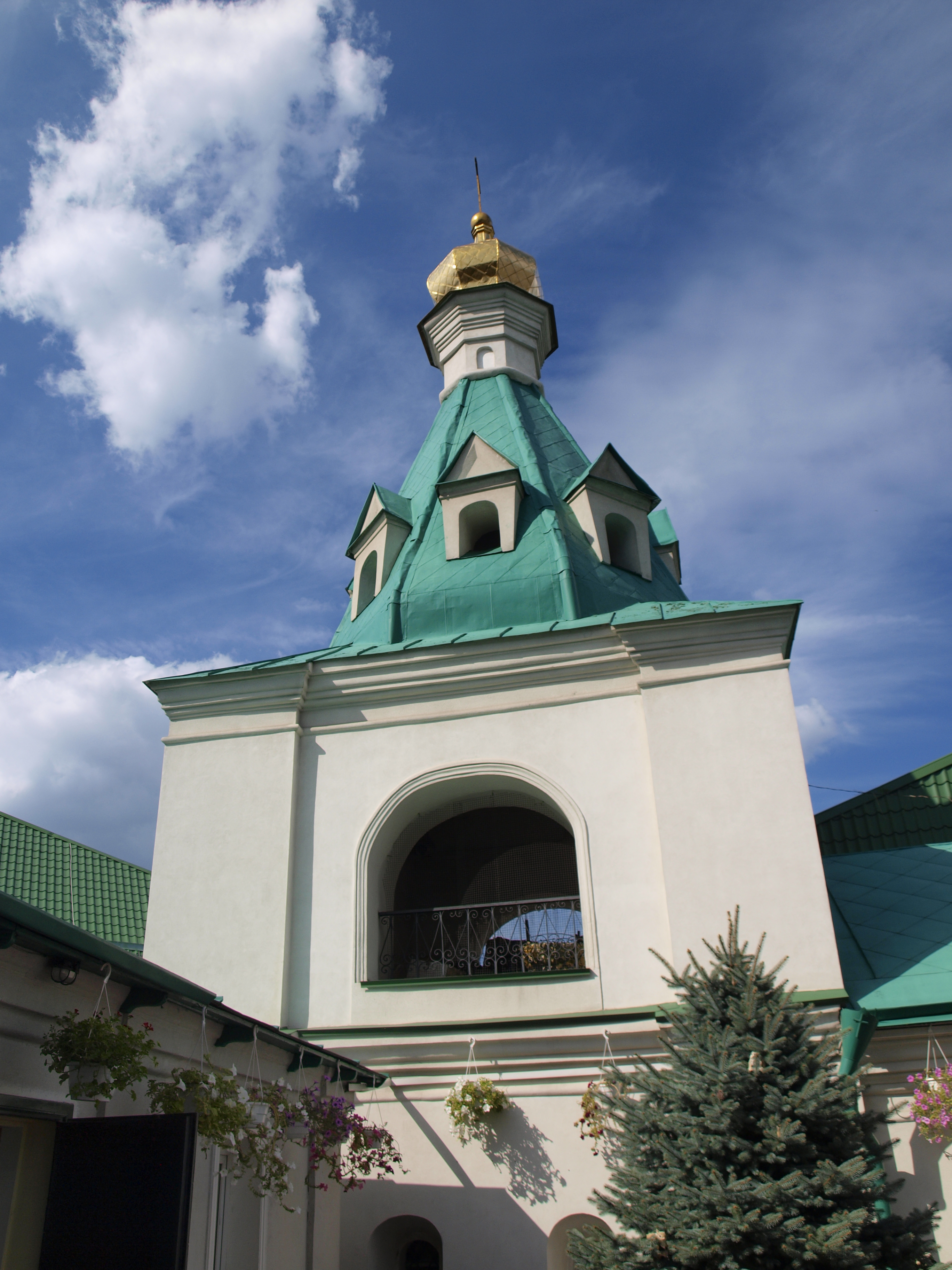 Колокольня Ильинской церкви в Киеве